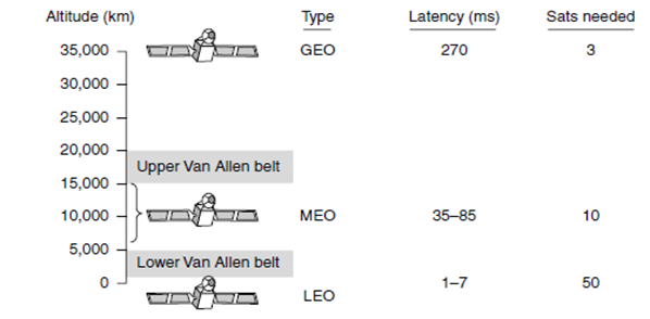 Rabitə peykləri və yerin yuxarı hündürlüyü daxil olmaqla bəzi xüsusiyyətləri, qlobal əhatə dairəsi üçün lazım olan peyklərin sayı.